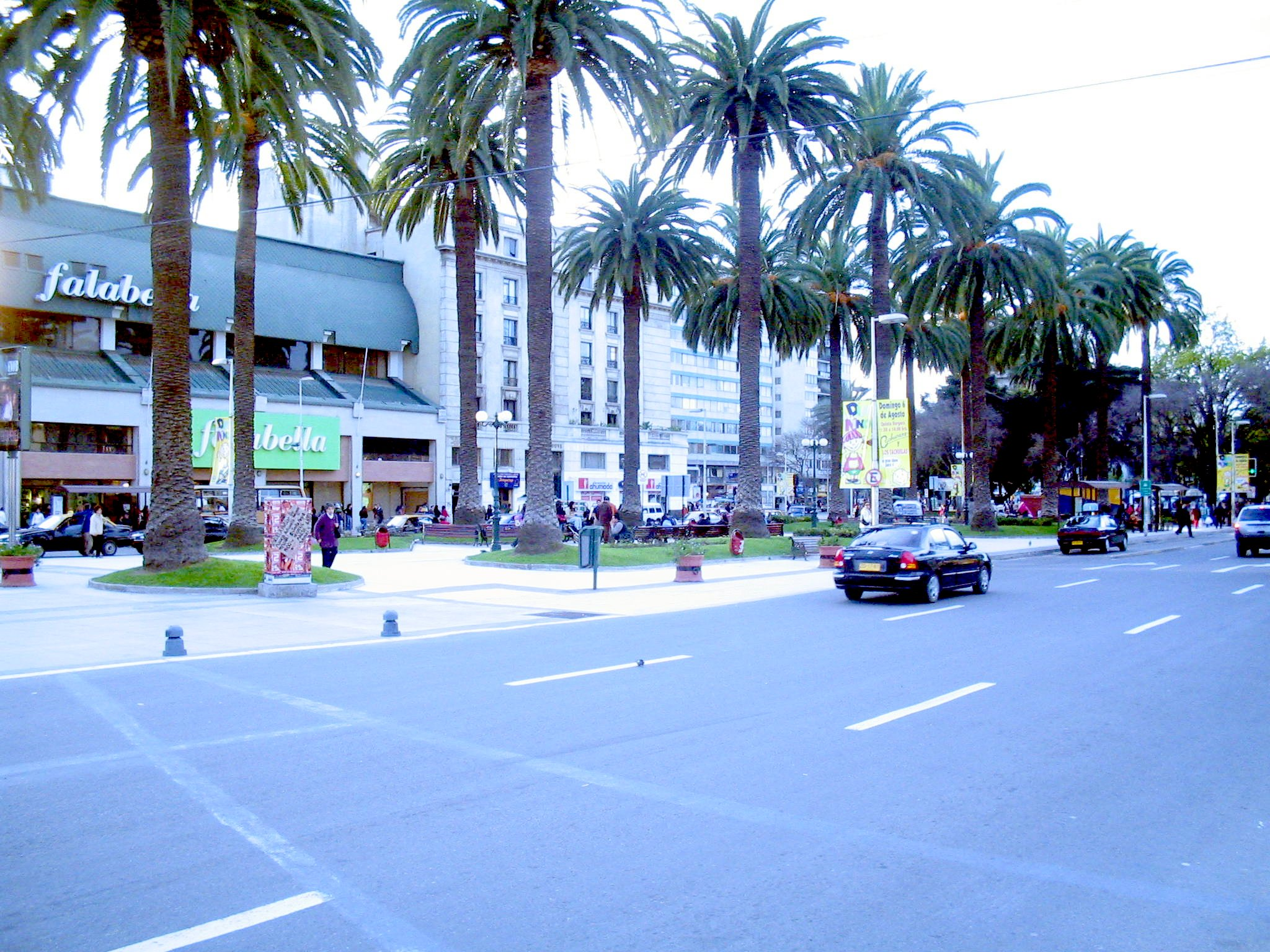 Plaza Sucre en Viña del Mar, Chile, 2006 Foto sacada por Carlos yo